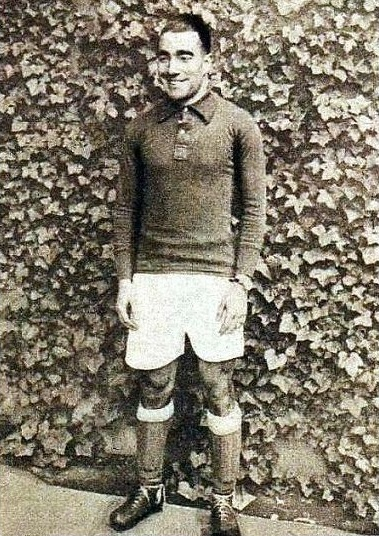 Anatol (Manuel, mai 1930 footballeur.